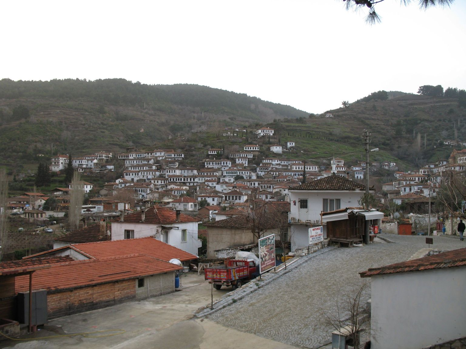 Sirince bei Kusadasi